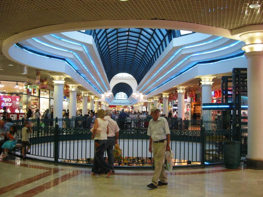 קניון מלחה בירושלים, מזווית הממחישה את העיצוב הייחודי של הקניון.